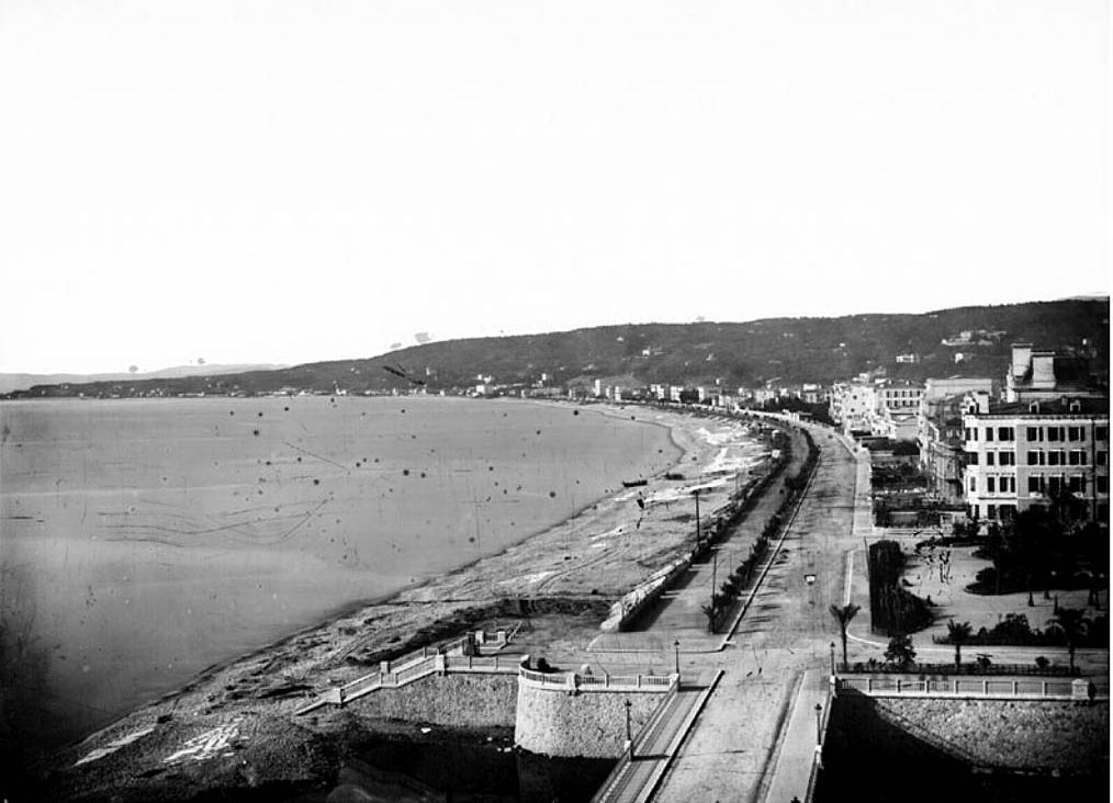 La Promenade des Anglais en 1865 à Nice vue depuis l'embouchure du Paillon. A droite le jardin public ébauche du futur jardin Albert 1er.